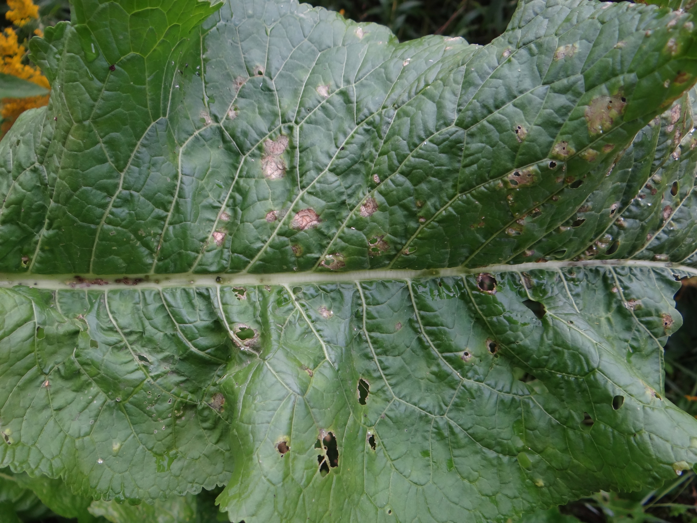 Hyaloperonospora cochleariae on leaf Armoracia rustucana. Location: Poland, Wierzchowie